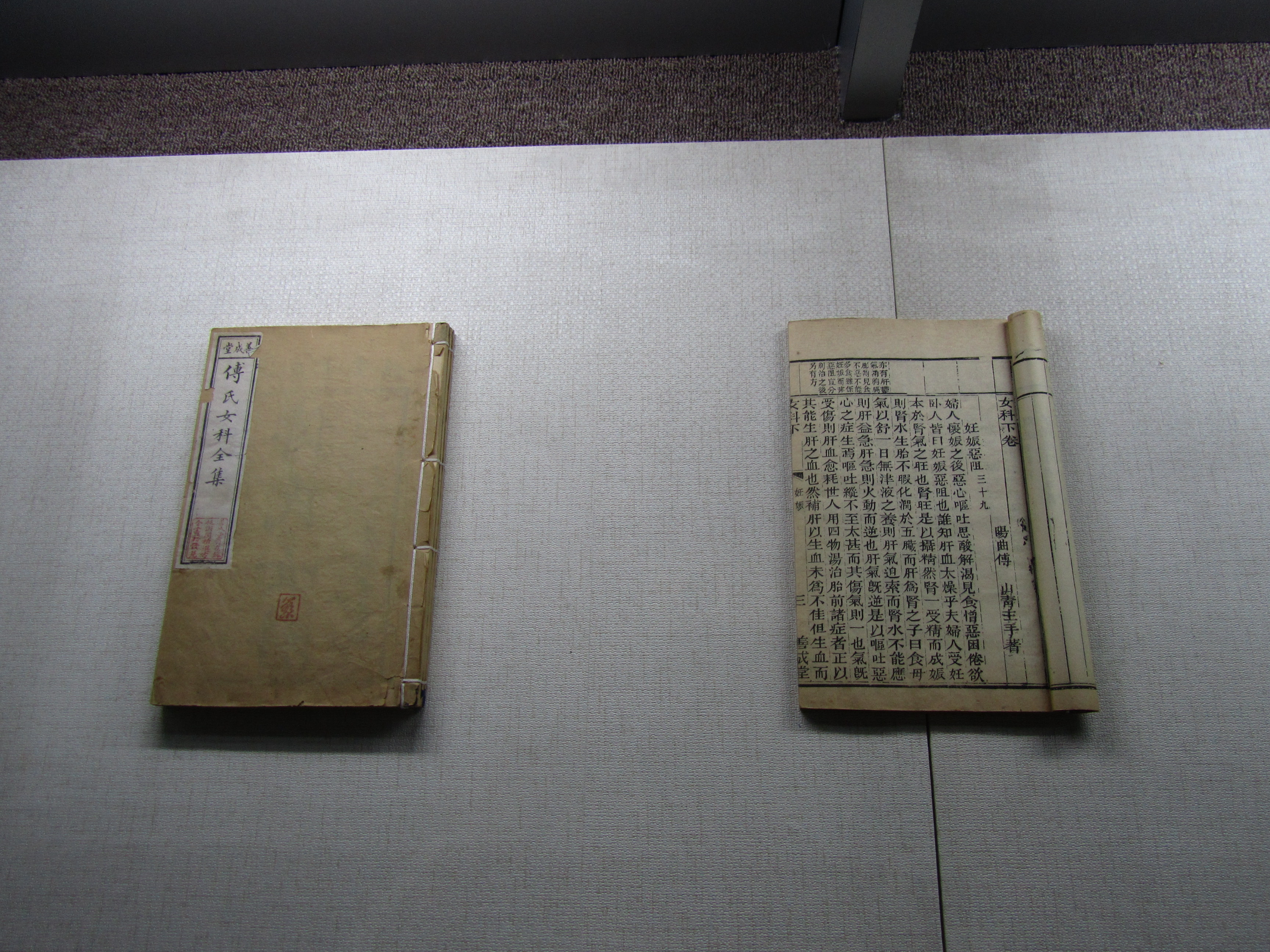 清代傅山所著《傅青主女科》，藏于晋祠傅山纪念馆。